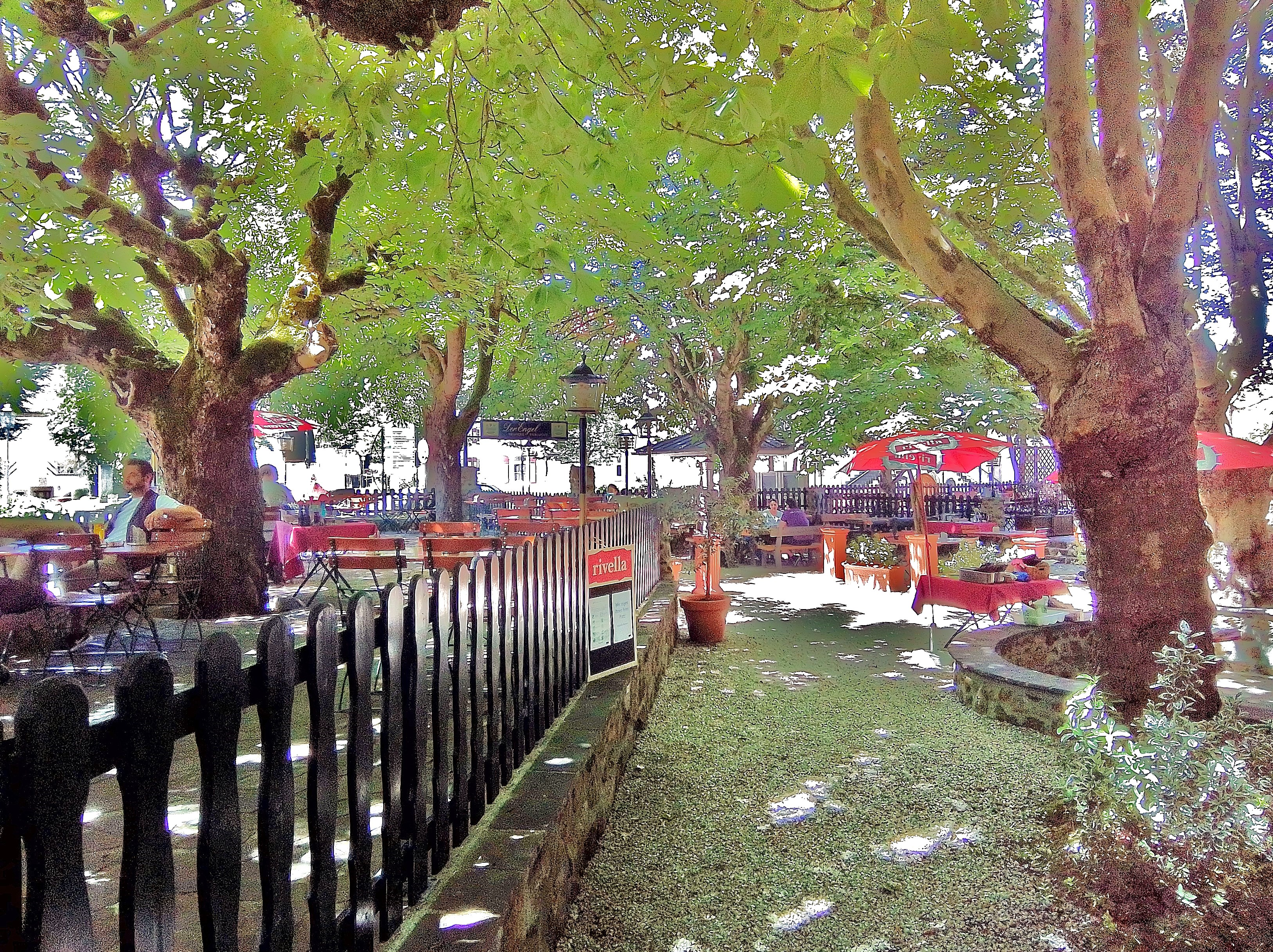 Gasthaus Der Engel in Rheinheim, Ortsteil der Gemeinde Küssaberg im Landkreis Waldshut in Baden-Württemberg. Der Biergarten.